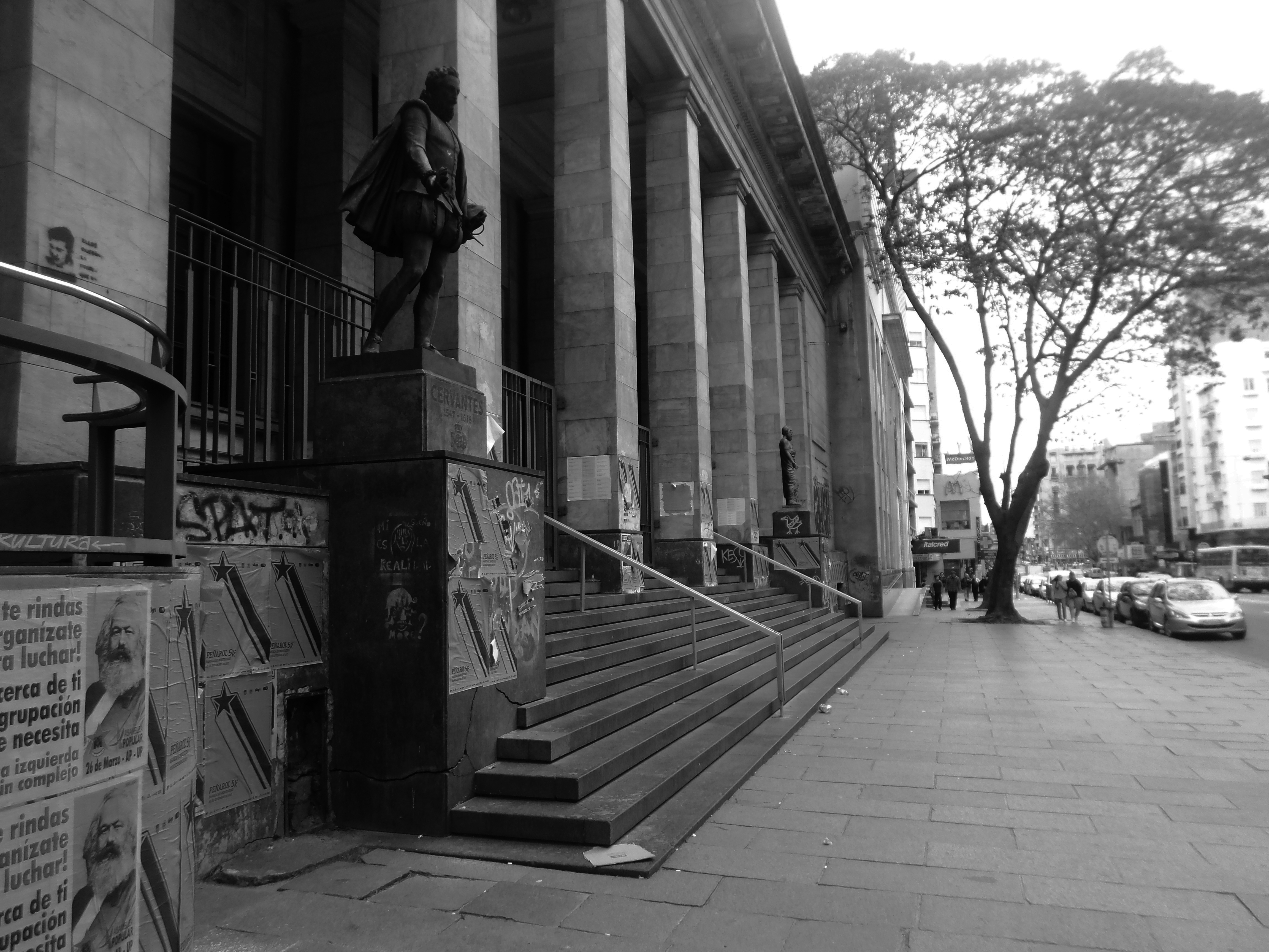 Biblioteca Nacional. Ubicada en el departamento de Montevideo